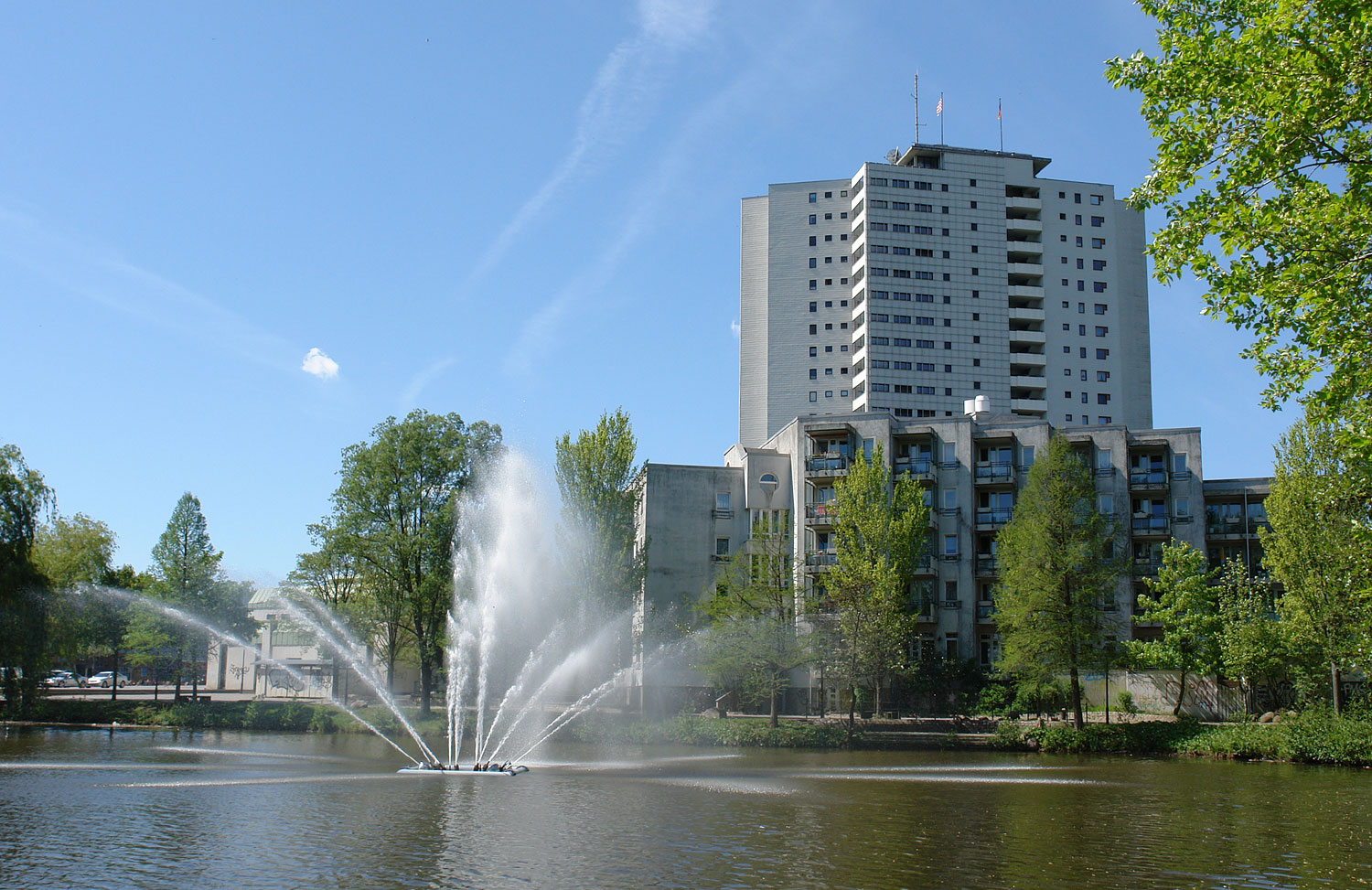 Bremen-Vahr: AWO-Seniorenwohnanlage Hanna-Harder-Haus, Berliner Freiheit 9 C. Dahinter das Aalto-Hochhaus